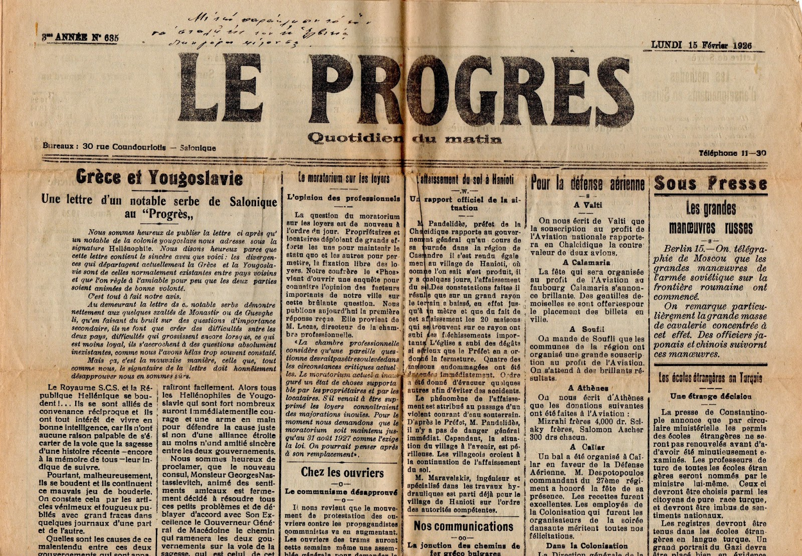 "Le Progres".